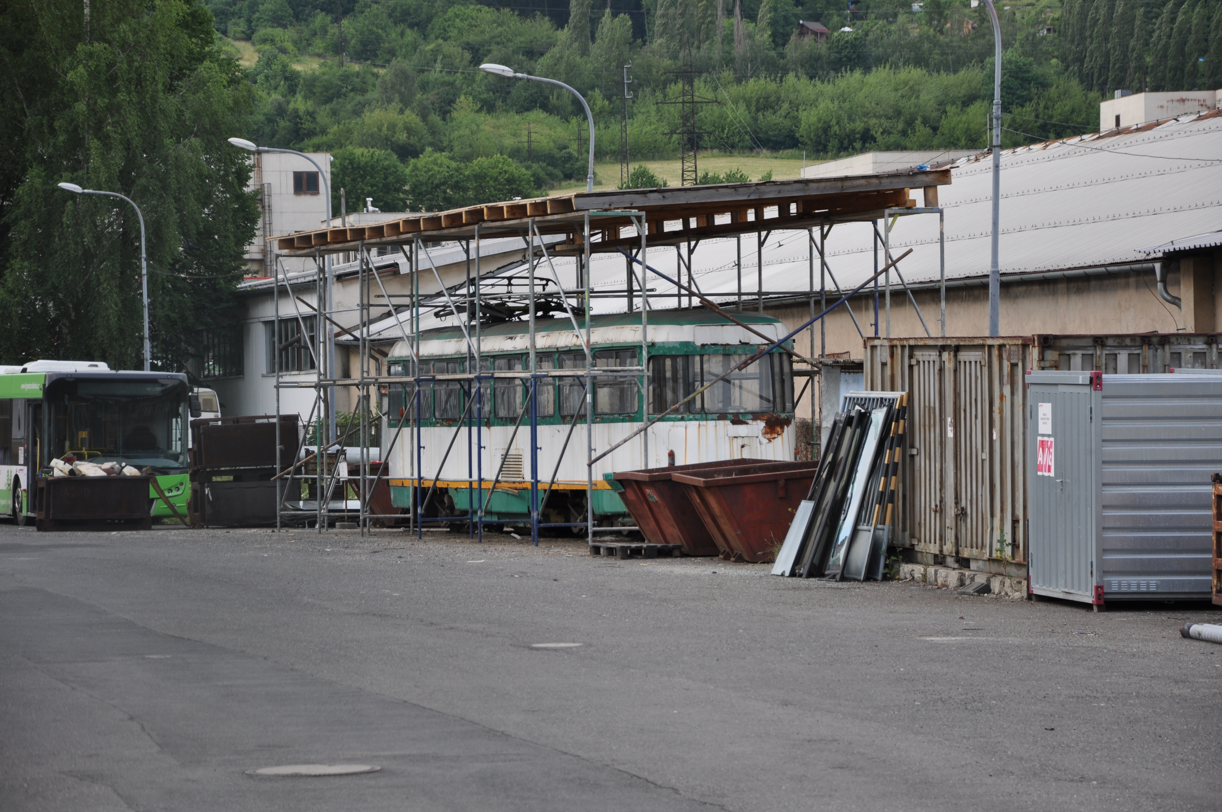 Straßenbahnwagen Tatra T2 im Betriebshof Předlice der Verkehrsbetriebe Ústí nad Labem, Tschechien. Der Wagen mit der ehemaligen Nummer 152 der Straßenbahn Ústí nad Labem war zuletzt bei der Straßenbahn Liberec im Dienst und ist für eine museale Erhaltung vorgesehen.